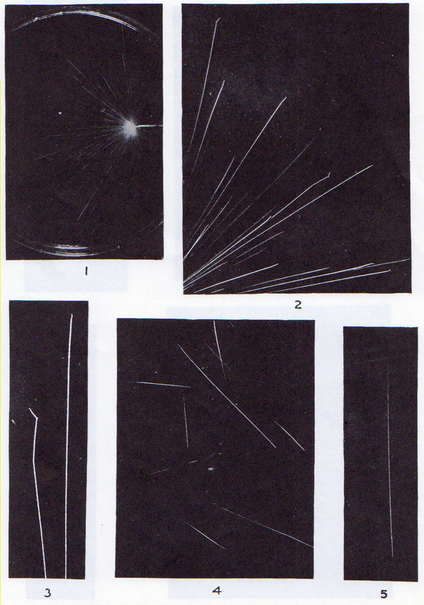 C.T.R.Wilson (1912). “On an Expansion Appeatus for making Visible the Tracks of Ionising Particles in Gases and Resuults obtained by its Use”. Roy.soc,Pric.,A 87: 355-371.にあるα前の画像。オリジナル論文より作成。